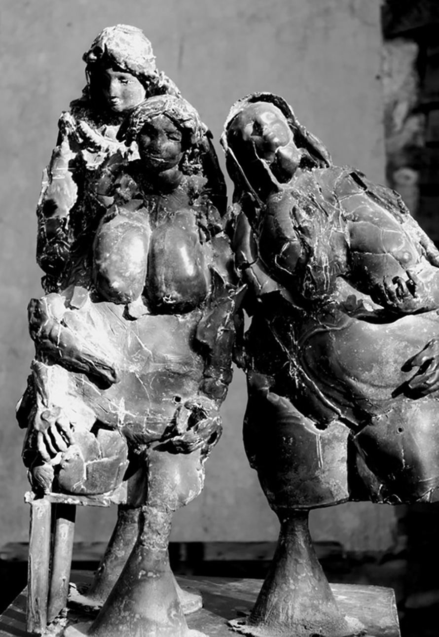 sculpture - Les pleureuses, bronze, ht. 75cm, 1995, coll. ville de Lyon